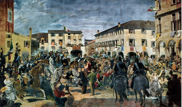 Alessio Valerio - Entrata delle truppe italiane a Piove di Sacco. L’artista,nato in questa città ma operante a Padova, realizza quest’opera dalle dimensioni monumentali per il Teatro Filarmonico del comune come sipario; solo in un secondo momento venne posta nella sede comunale per problemi di conservazione. La scena rappresenta un momento storico: il 14 luglio 1866 le truppe italiane entrarono a Piove di Sacco fra le acclamazioni degli abitanti.